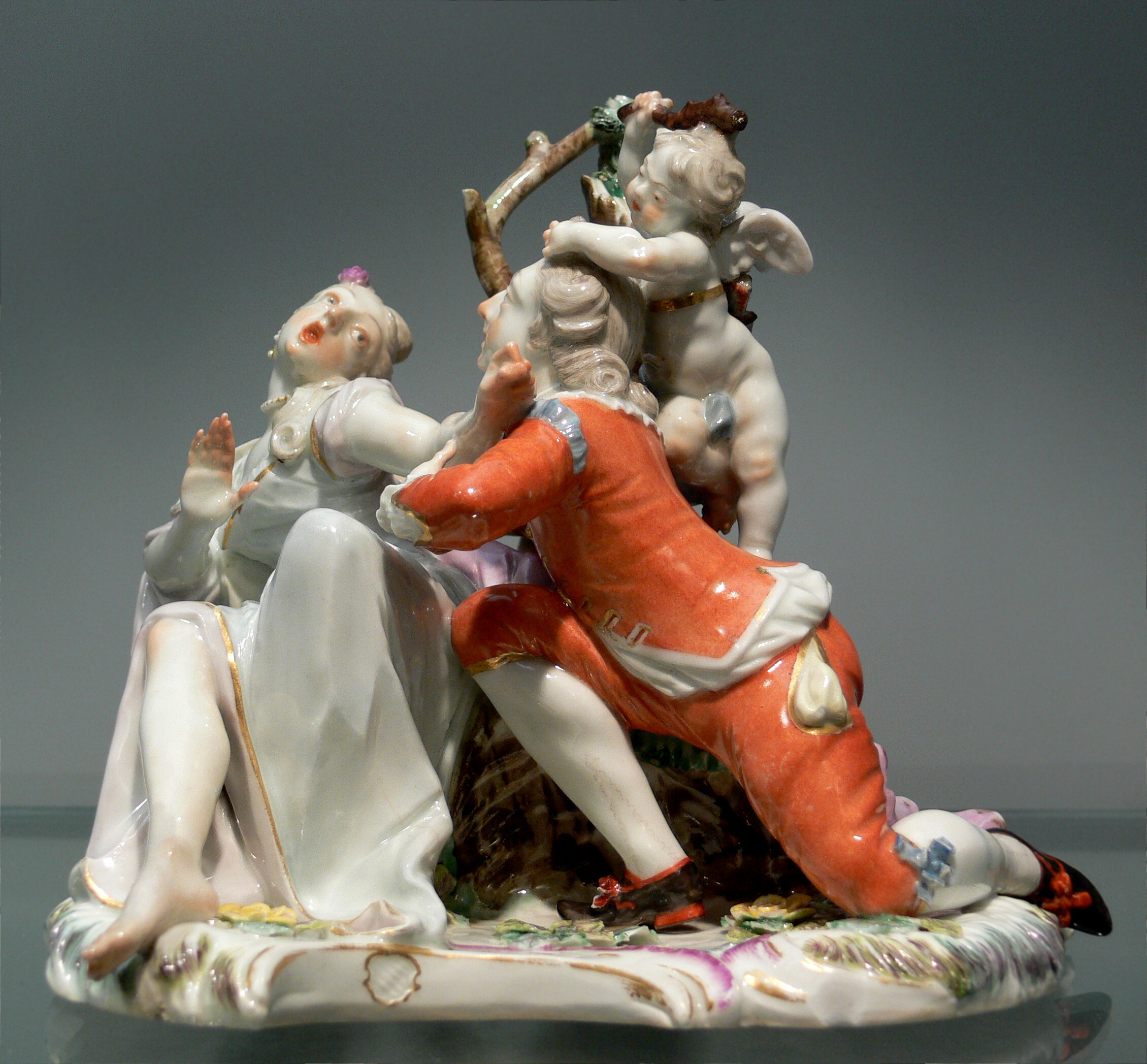 Franz Anton Bustelli: Liebesgruppe „Der stürmische Galan“, um 1756 Porzellanmanufaktur Nymphenburg Bayerisches Nationalmuseum München